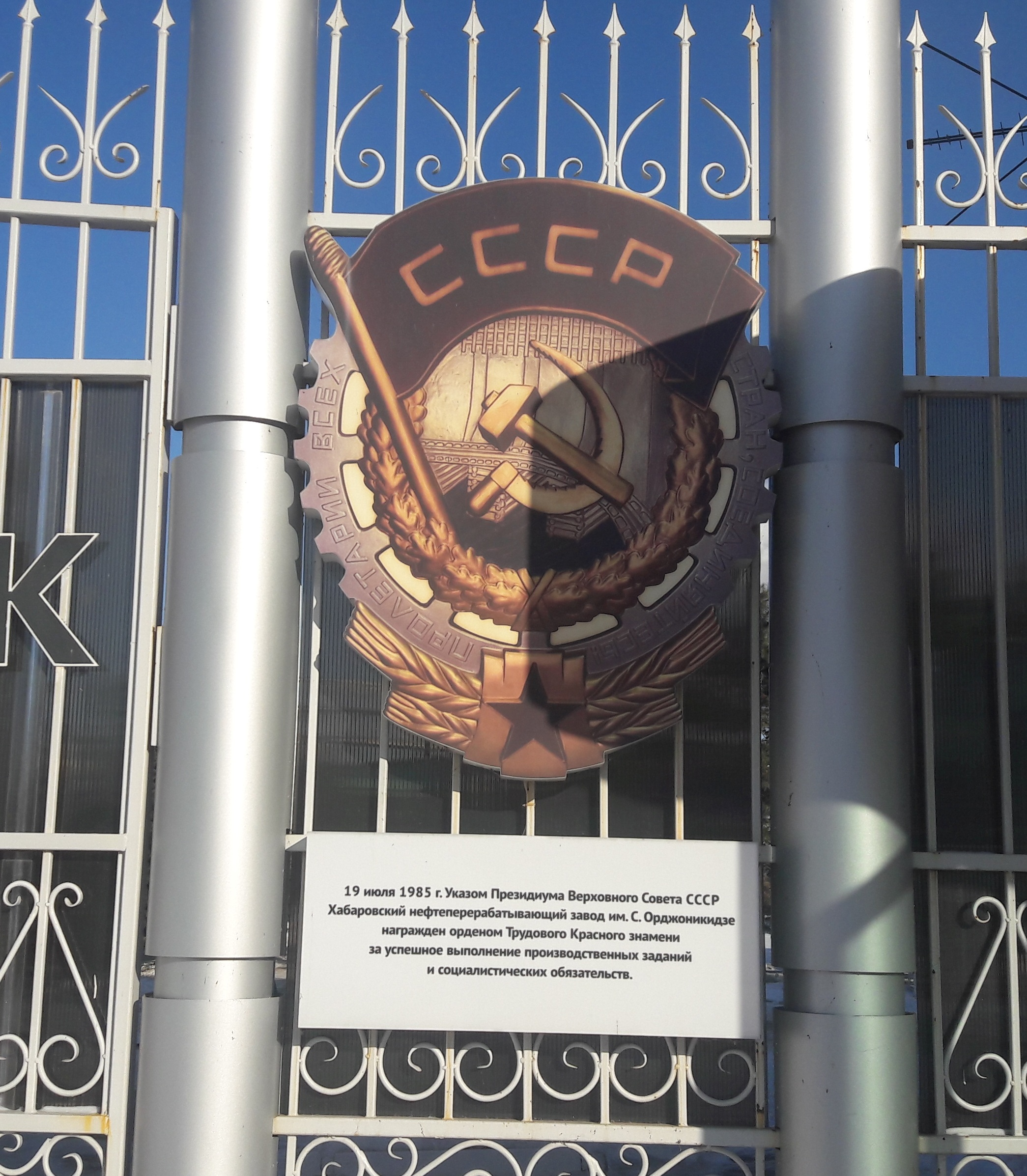 орден Трудового Красного Знамени на проходной ХНПЗ